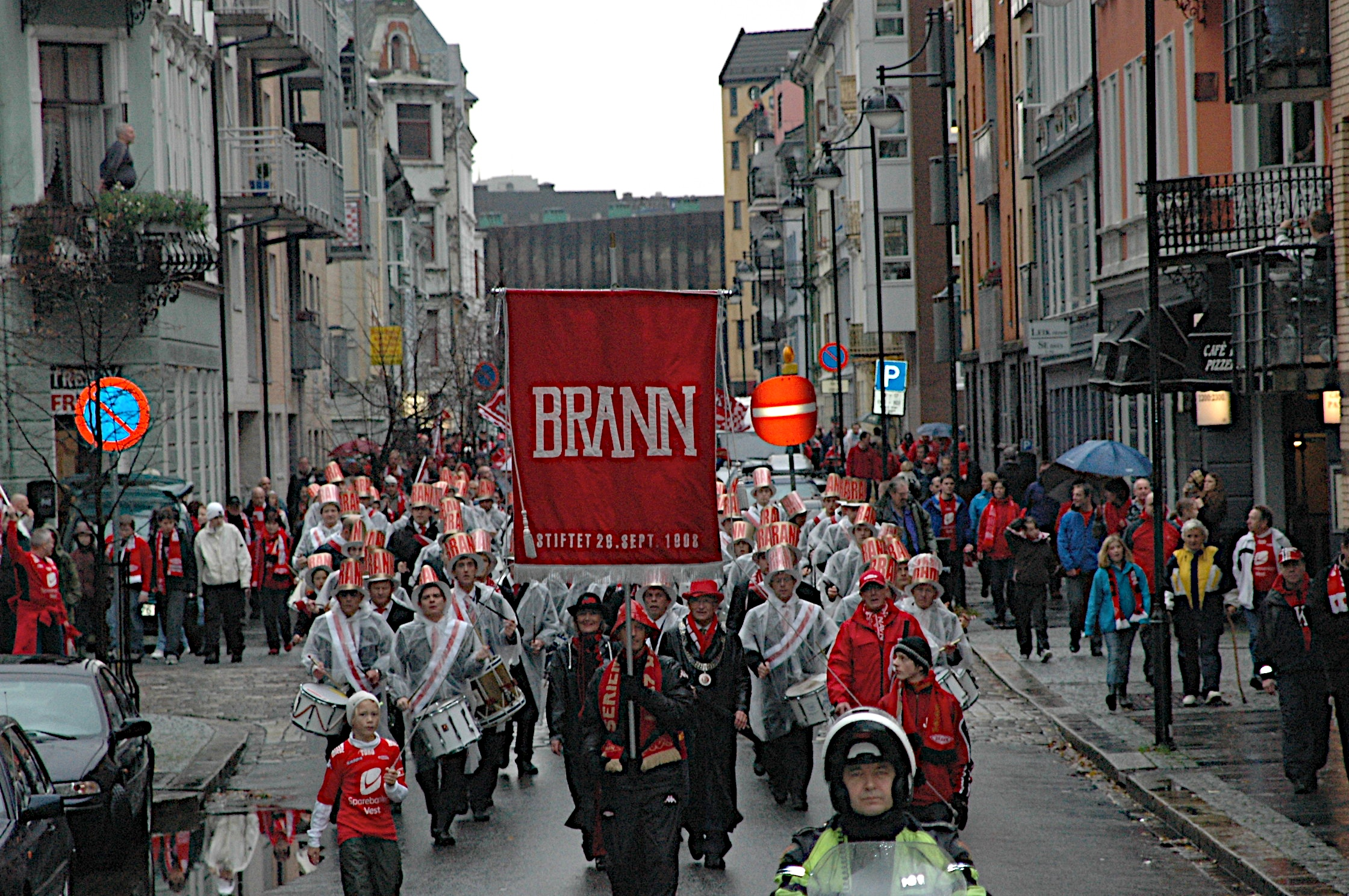 Gullmarsj for Brann 2007